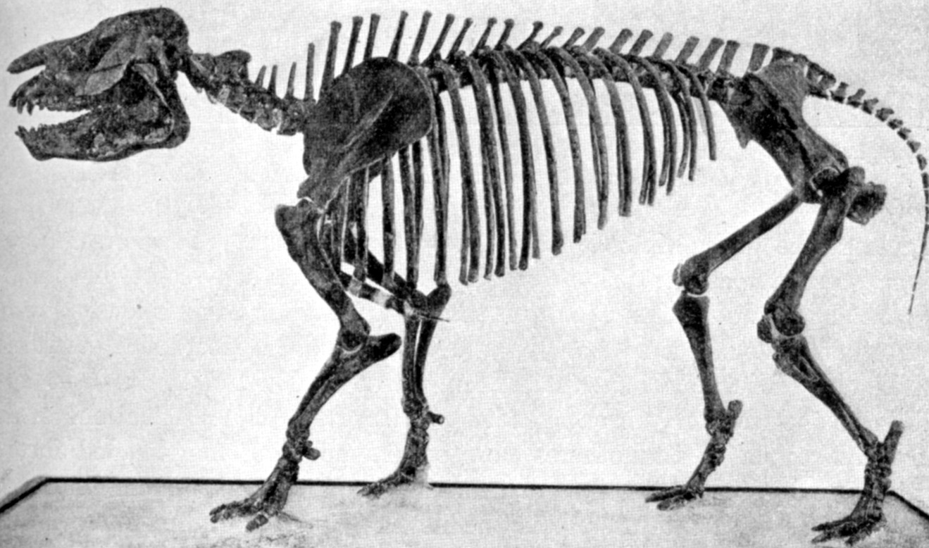 Palaeosyops leidyi skeleton.